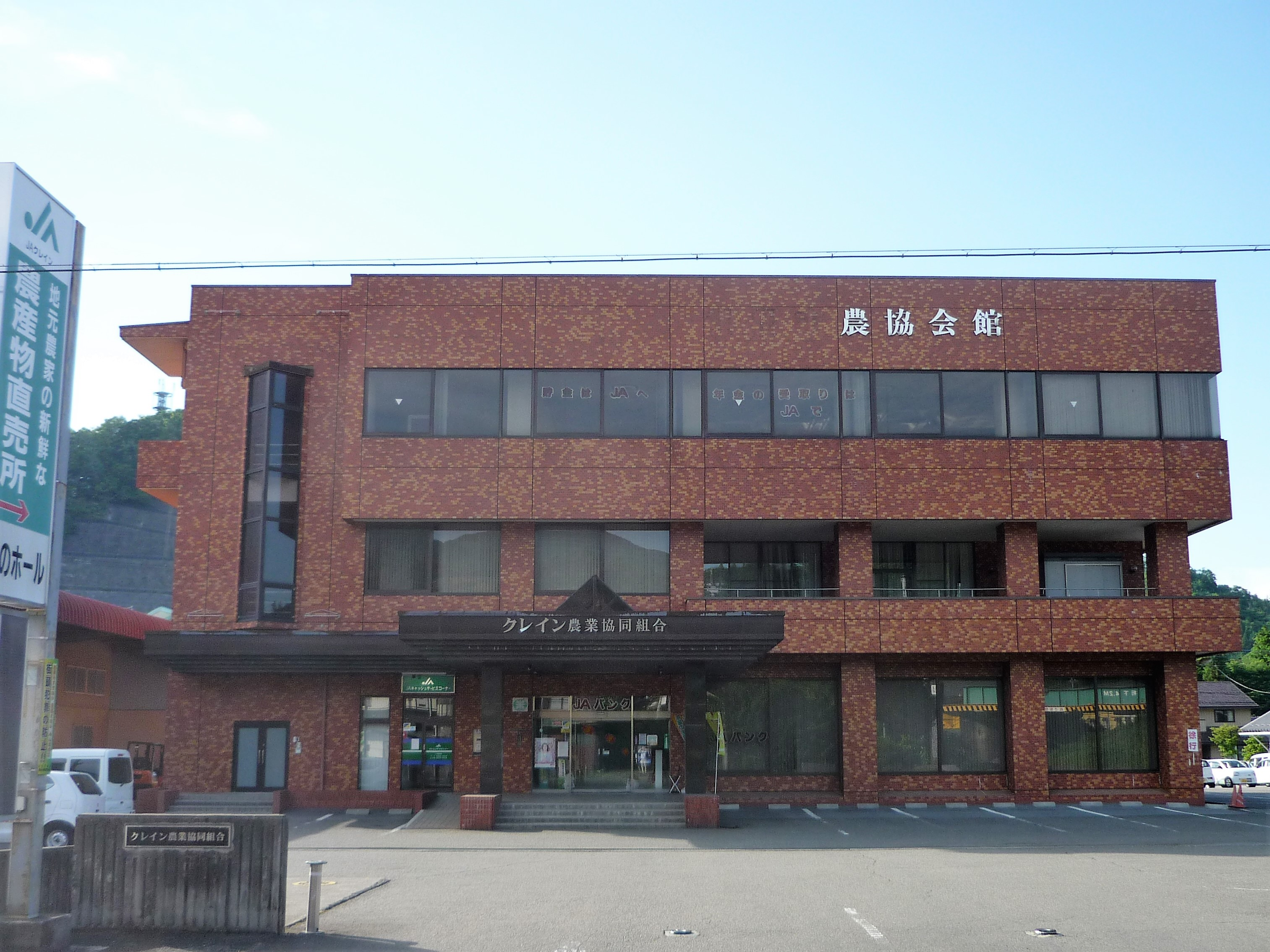 クレイン農業協同組合本店（都留市田原） Panasonic Lumix DMC-FS3